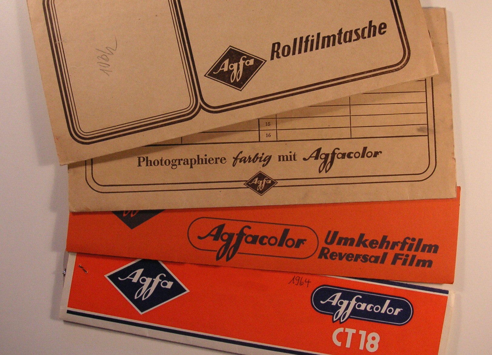 Agfacolor bildfickor från 1950-1965